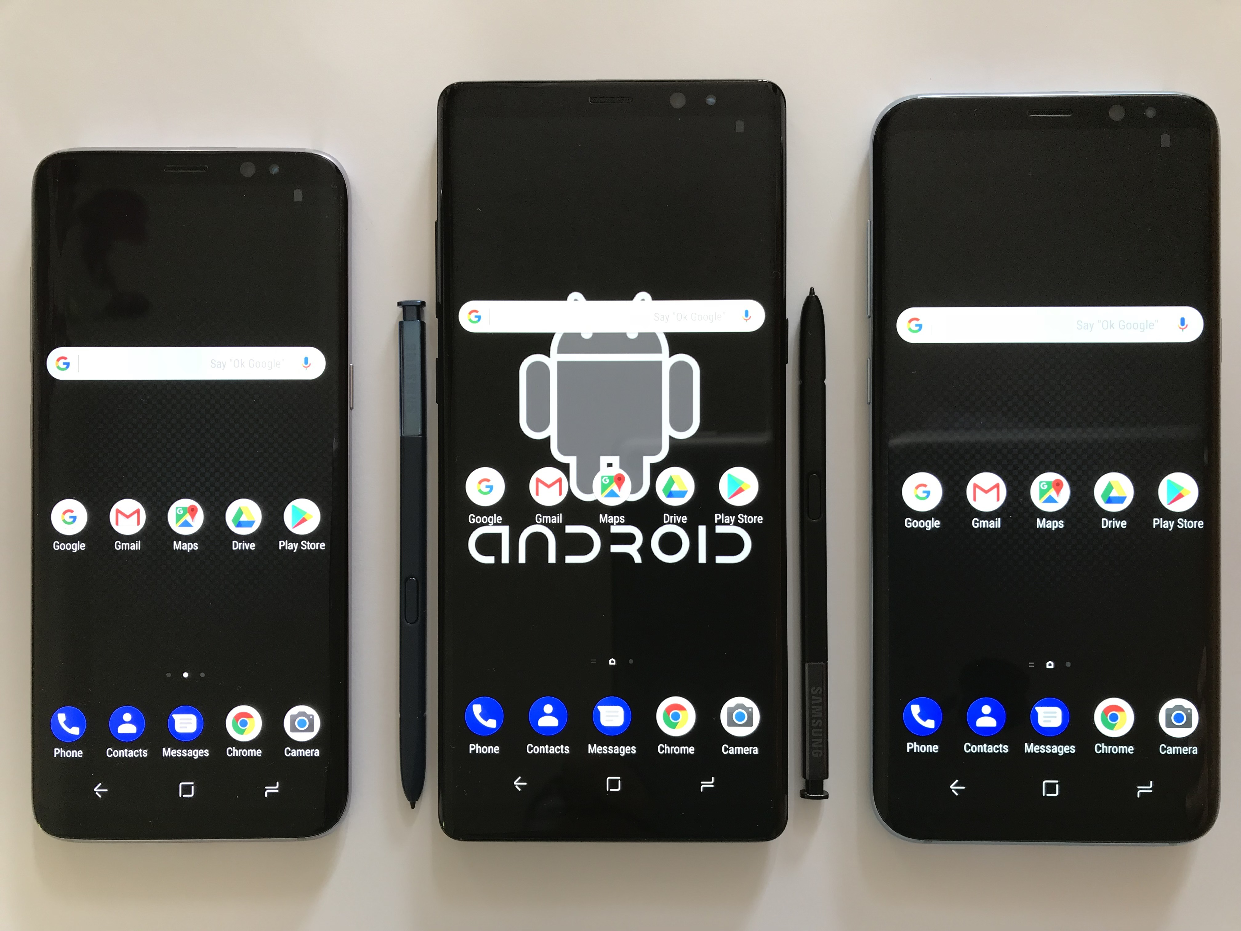 Android User Interface